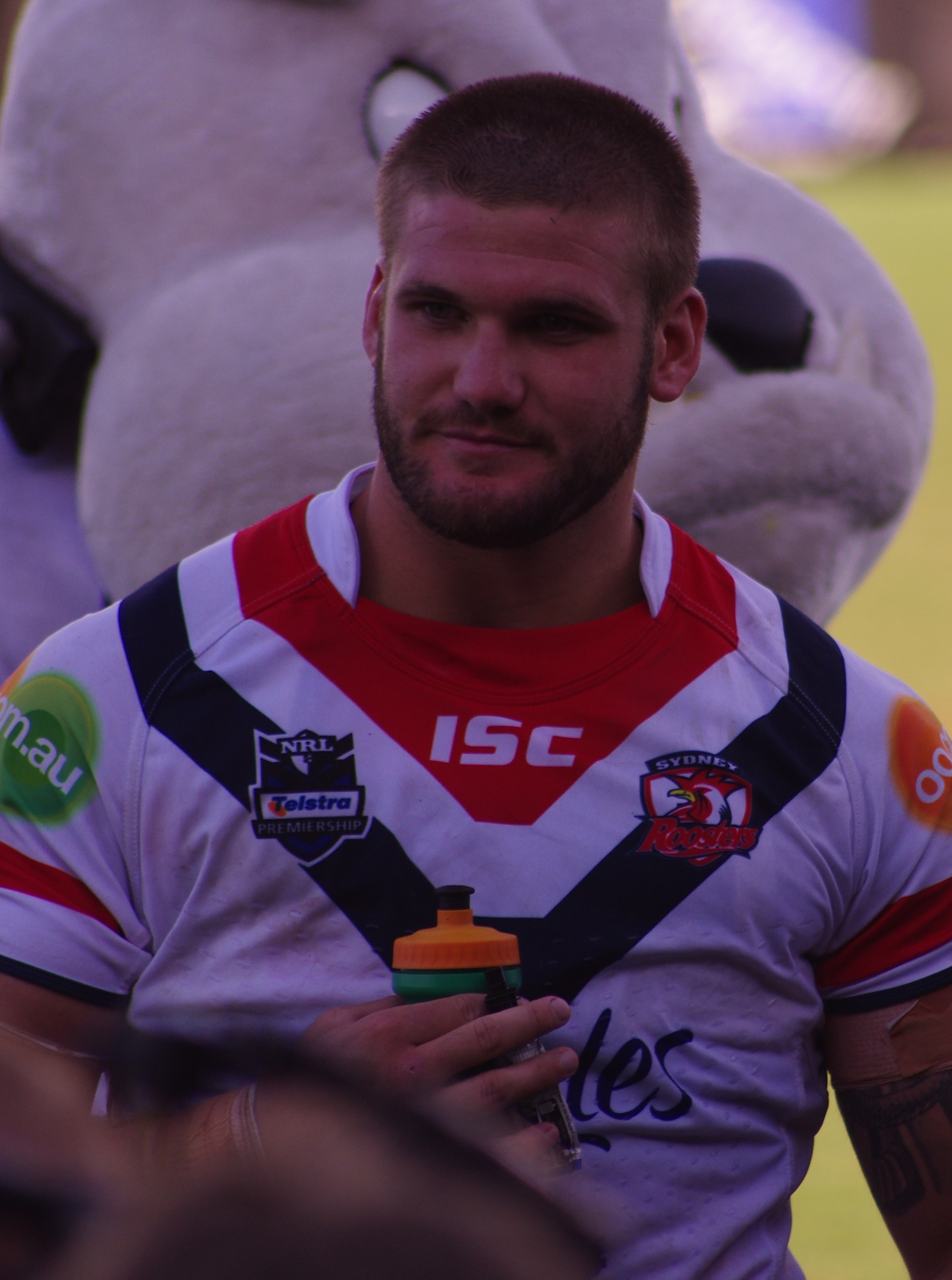 Jack bosden